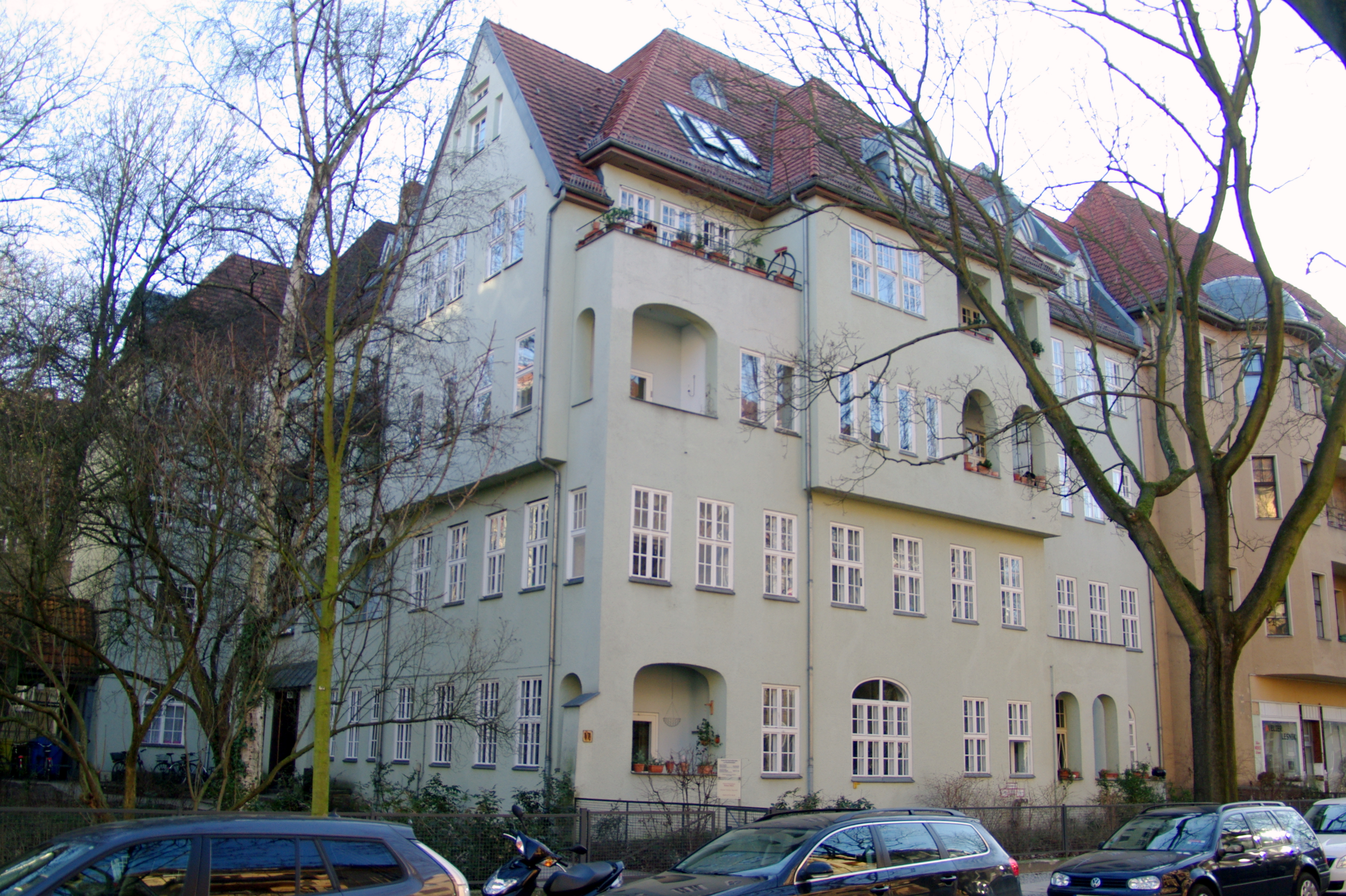 Einküchenhäuser Wilhelmshöher Straße Berlin-Friedenau .Hausnr, 17